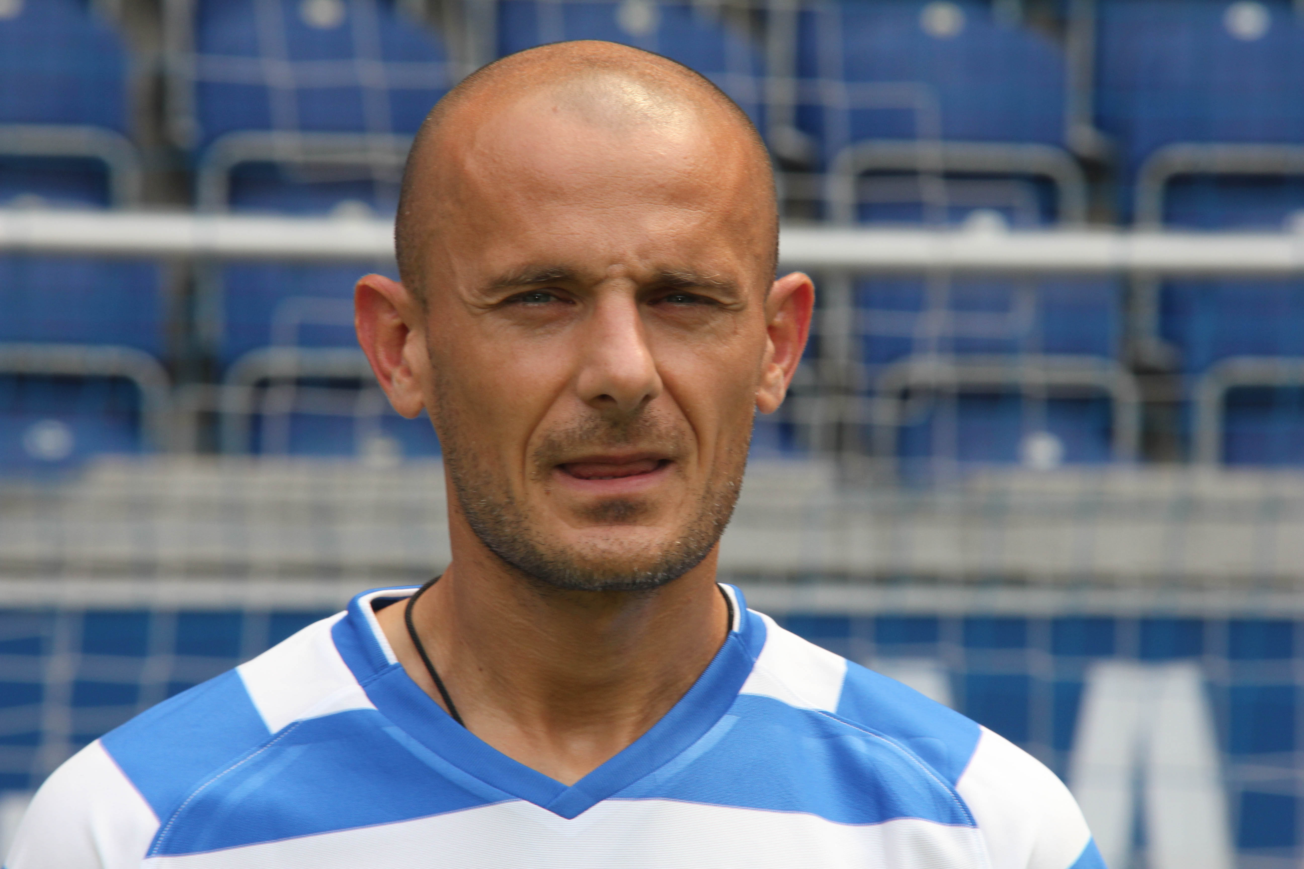 Serbian footballer Srđan Baljak, MSV Duisburg